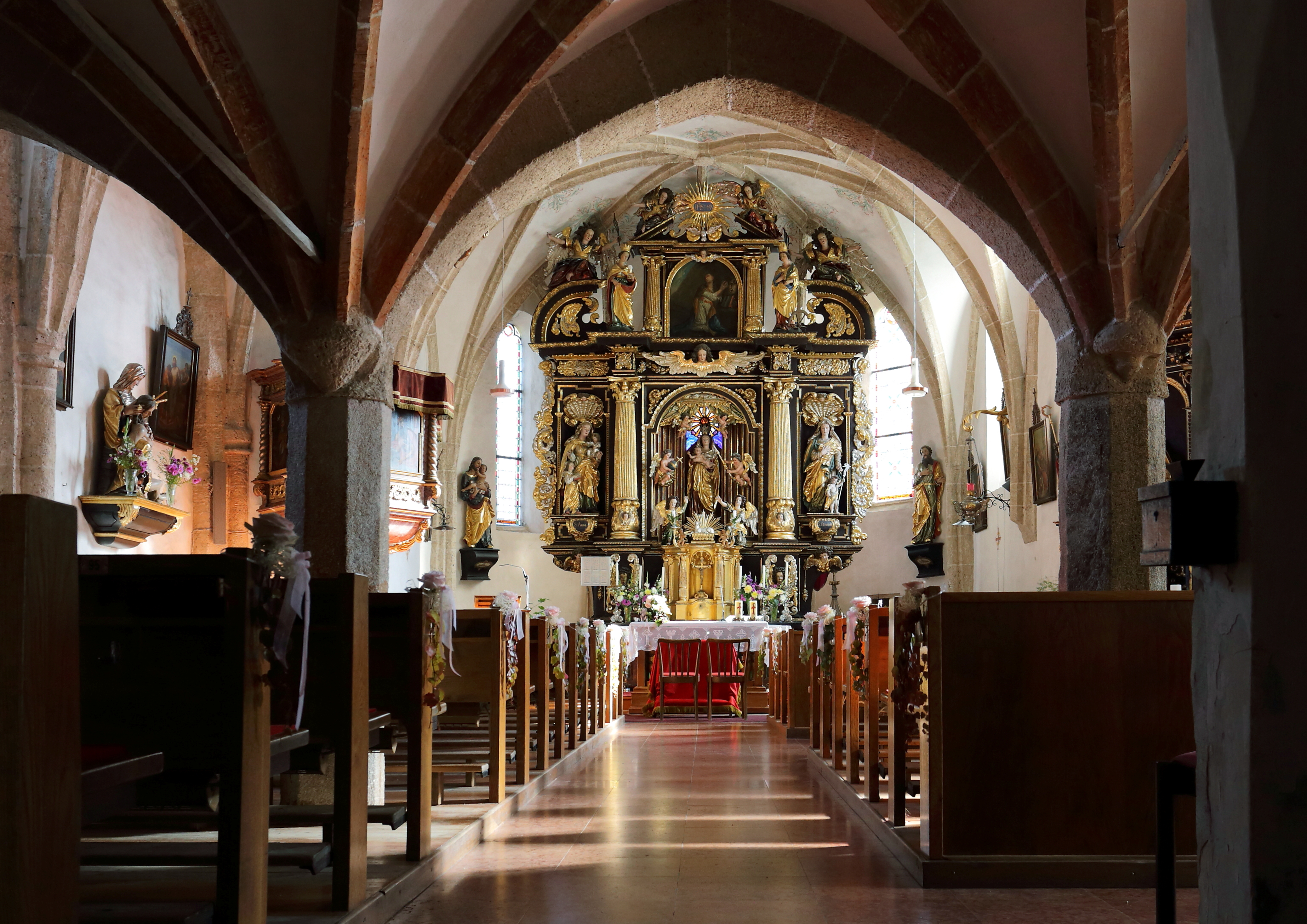 Innenansicht der katholischen Pfarrkirche Mariä Namen in der oberösterreichischen Gemeinde Wippenham.